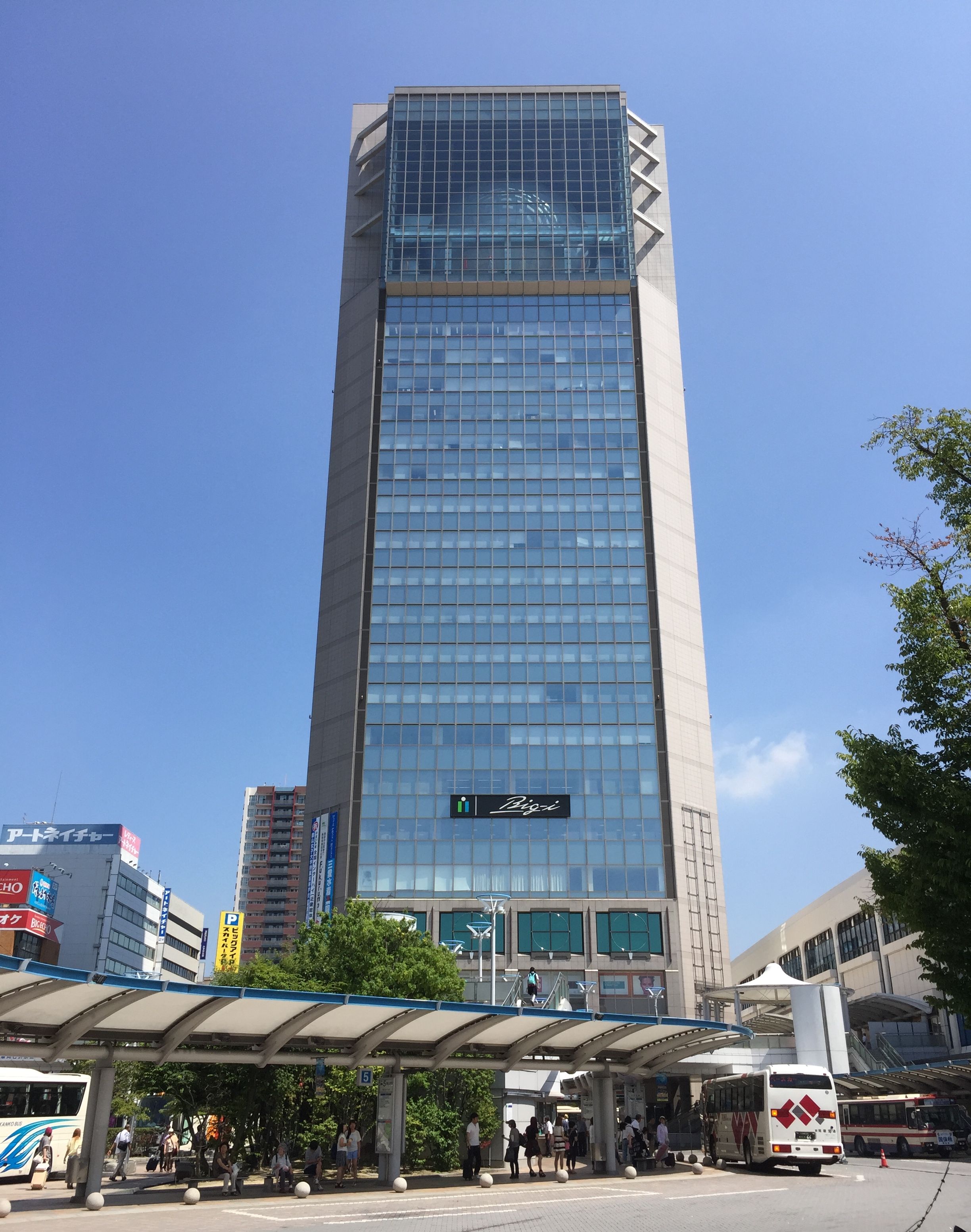 郡山ビッグアイ